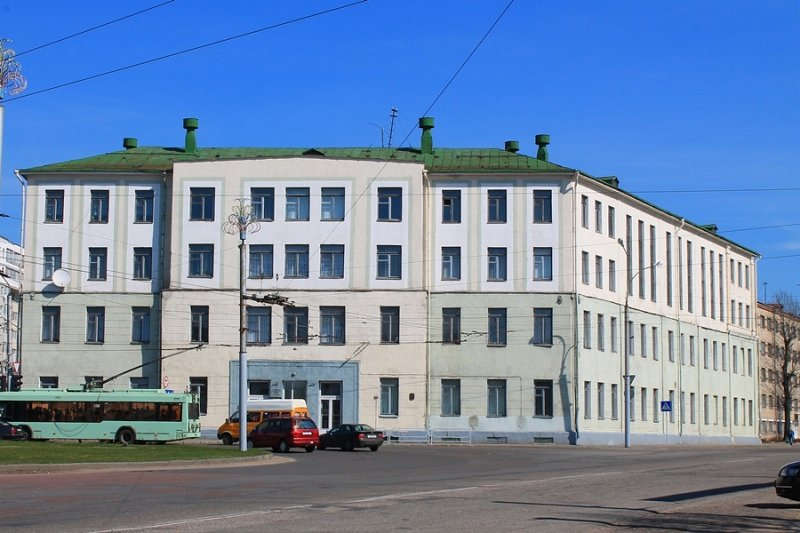 Былое рэальнае вучылішча